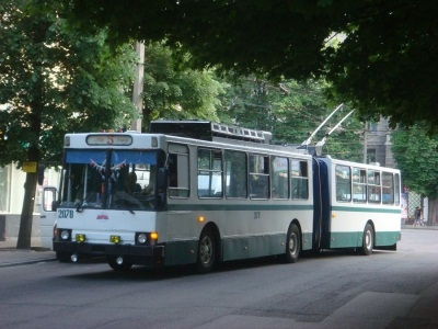 один из нимногих Т-2 в днепропетровске